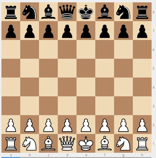 சதுரங்கம்